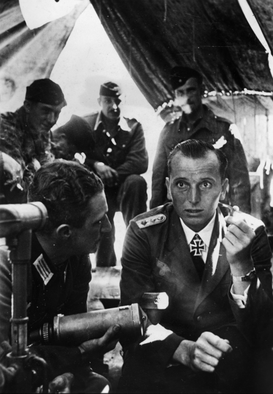 Nach dem OKW-Bericht vom 4.11. hat das unter Führung von Kapitänleutnant Kretschmer stehende Unterseeboot die britischen Hilfskreuzer "Laurentic" (18724 BRT) und "Patroclus" (11314 BRT) sowie das bewaffnete britische Handelsschiff "Casanare" mit 5376 BRT versenkt. Als zweiter Unterseeboot-Kommandant vernichtete er insgesamt über 200.000 BRT, nämlich 217.198. Unser Bild zeigt Kapitänleutnant [Otto] Kretschmer nach der Heimkehr von einer Feindfahrt, wie er von dem Sprecher einer Propagandakompanie über seine Erlebnisse befragt wird. PK-Fremke - Scherl KG 4.11.40 [Herausgabedatum] Interview Otto Kretschmer mit einem Radioreporter einer PK-Einheit (PK-Wortberichter); zwischen August-Oktober 1940